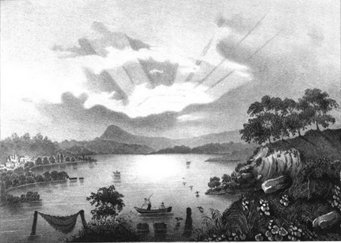 Lac de Paladru